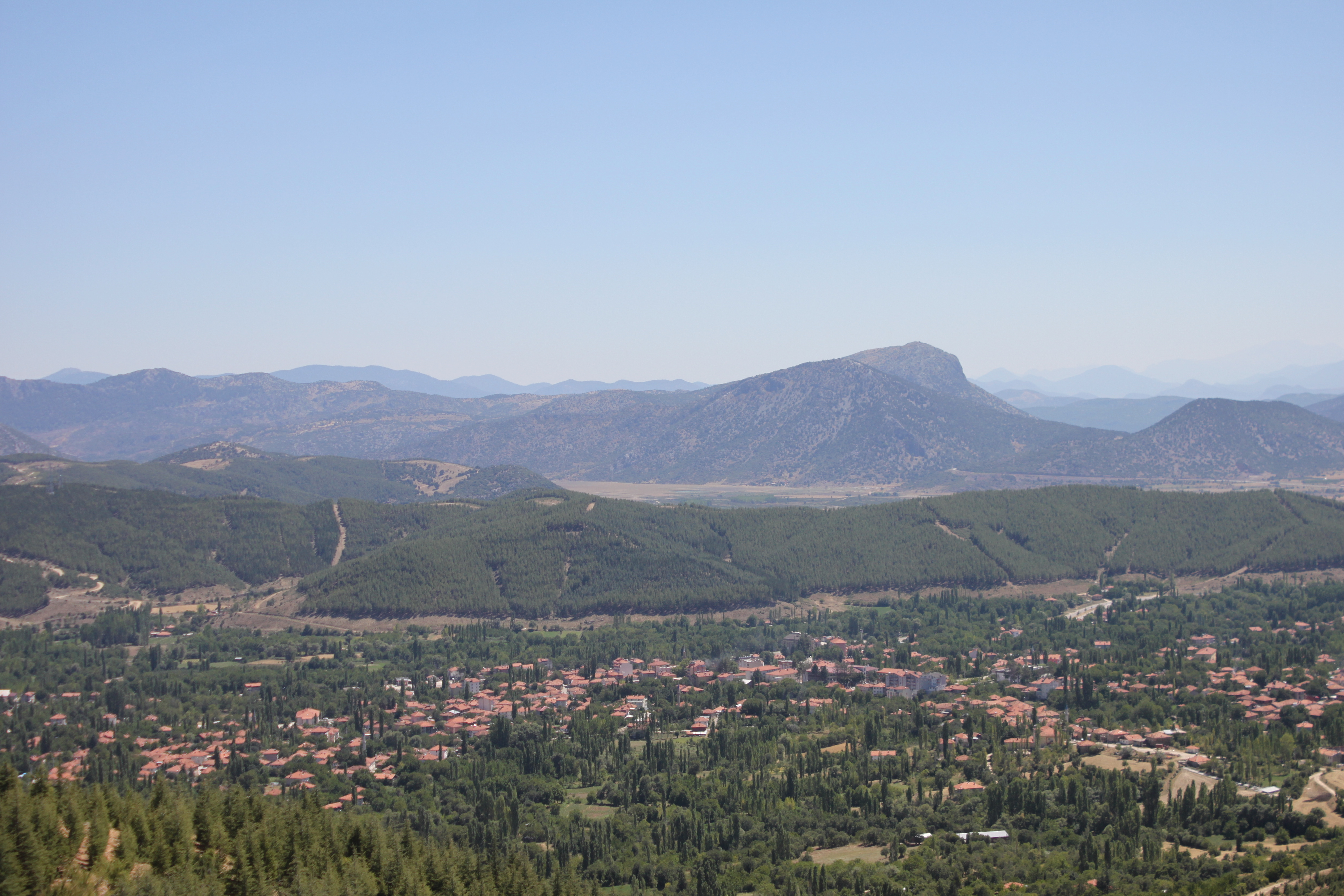 Blick von Sagalassos am Fuße des Akdağ auf Ağlasun und das Tuzlu-çay-Tal.